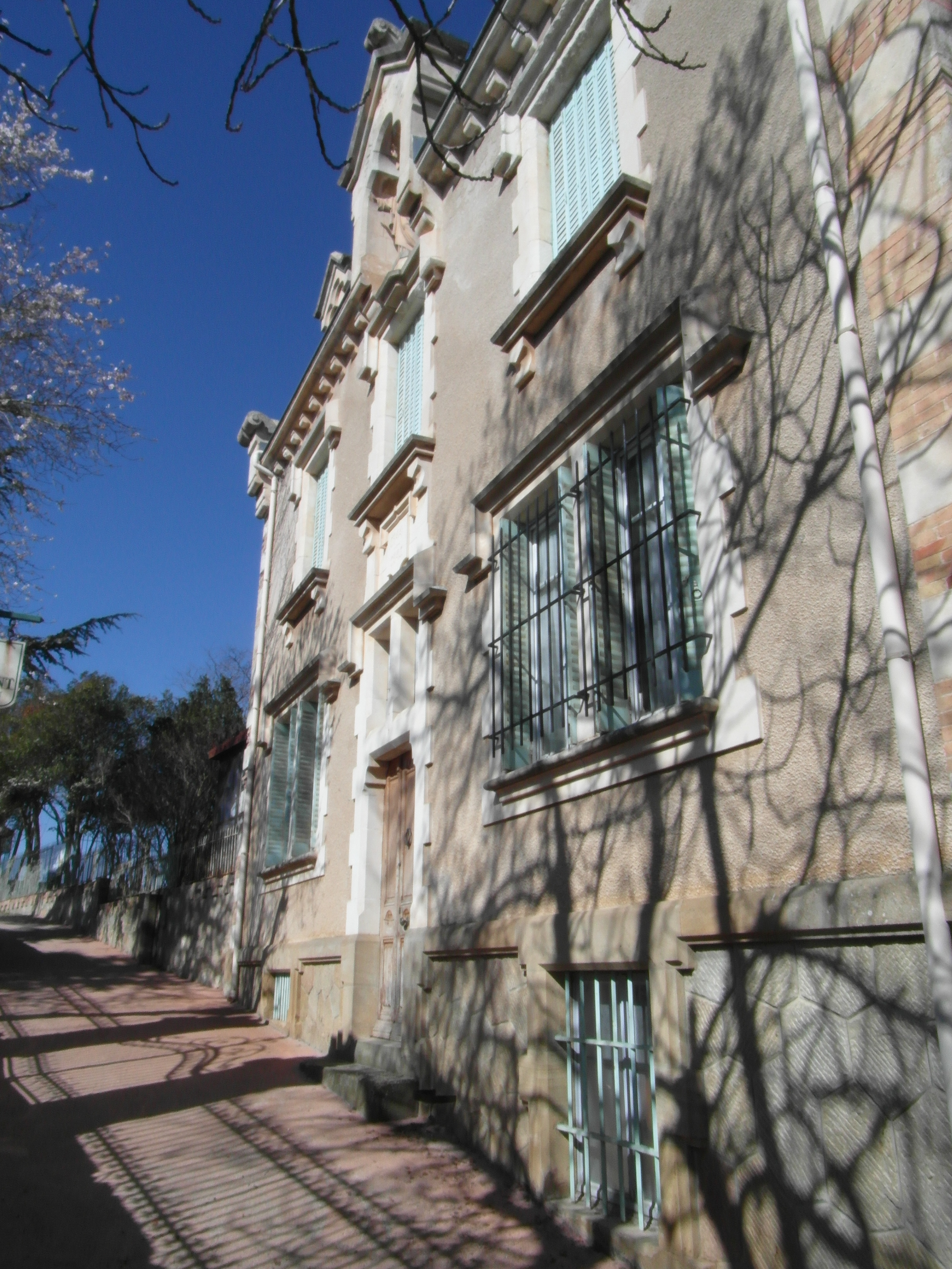 rue de Rennes le Chateau